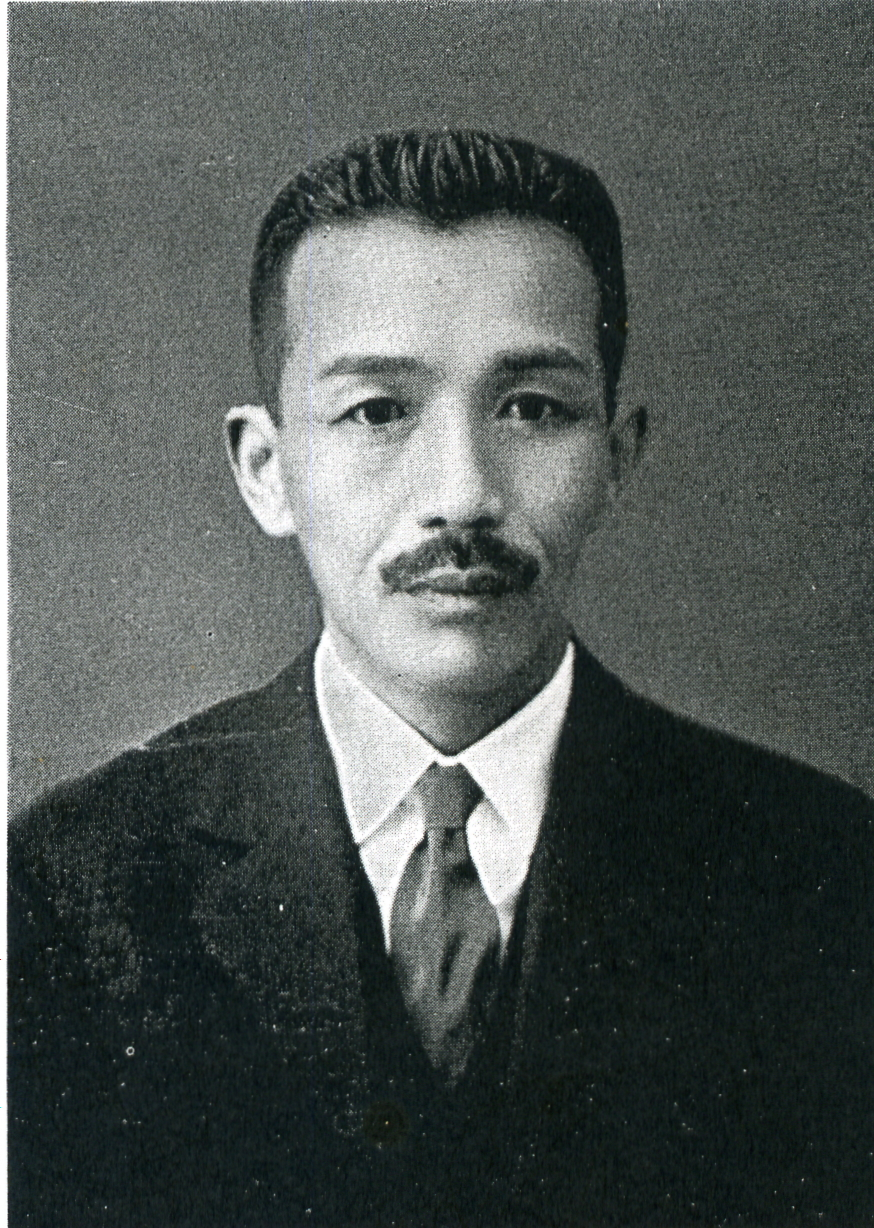 この写真は、助川啓四郎（1887-1943）の写真です。